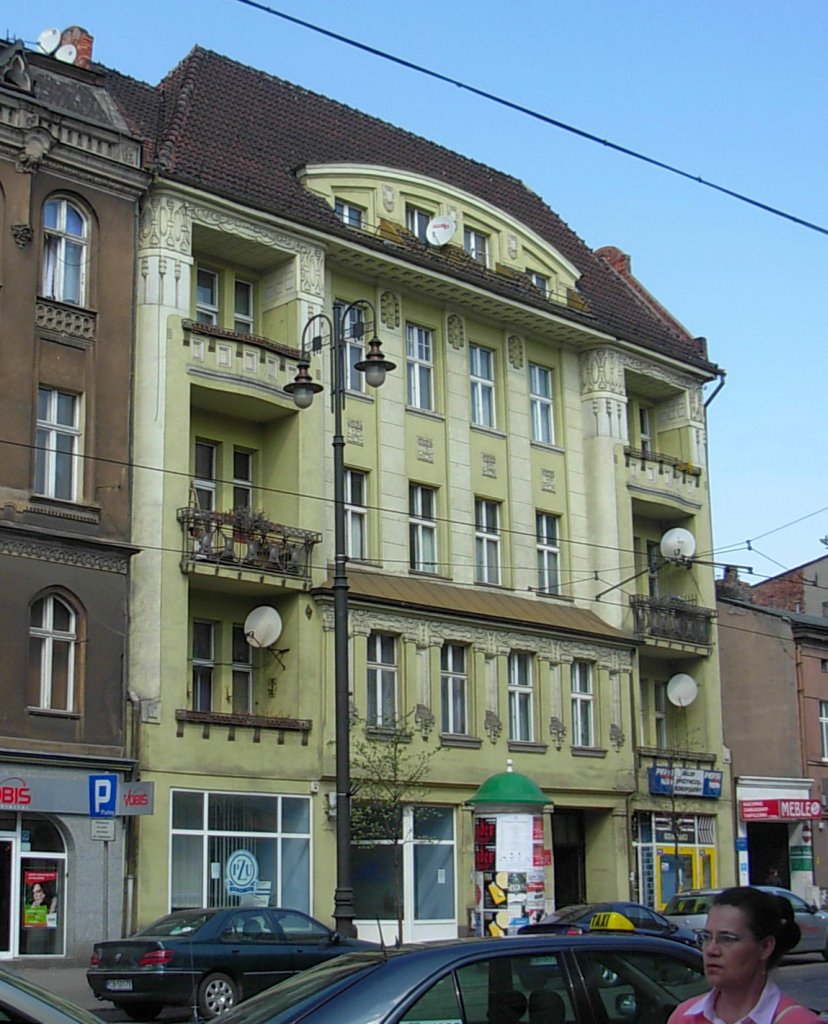 Kamienica ul. Gdańska 71 w Bydgoszczy